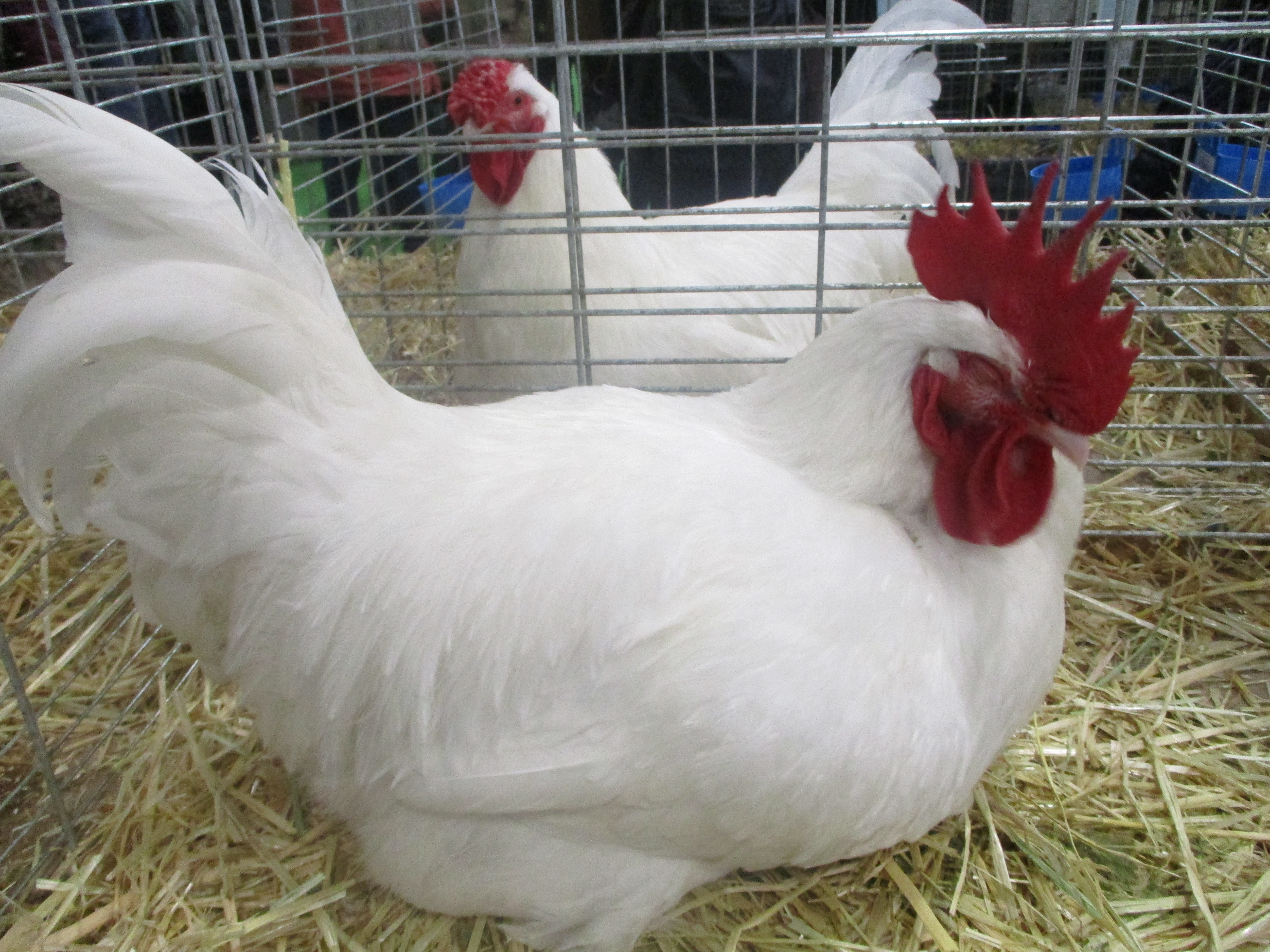 Coq gâtinais et poule gâtinaise au salon international de l'agriculture de Paris 2020.